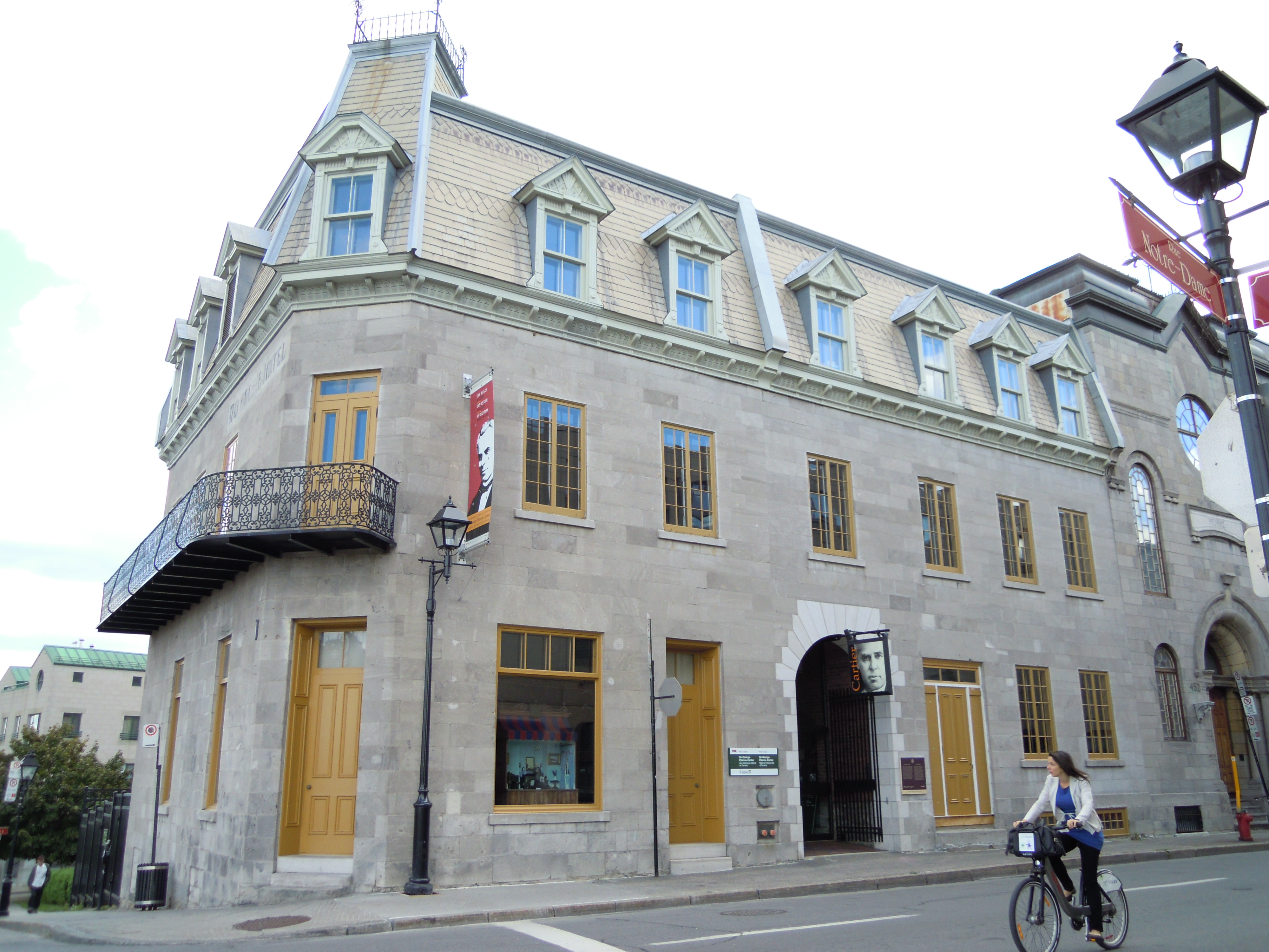 Maison George-Étienne Cartier. Prise de vue à l'angle des rues Notre-Dame et Berri à Montréal.